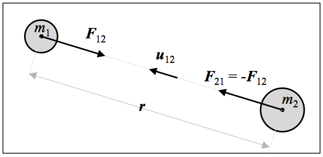 Newtonen grabitate-indarraren formulan ageri diren sinboloen adierazpen grafikoa.